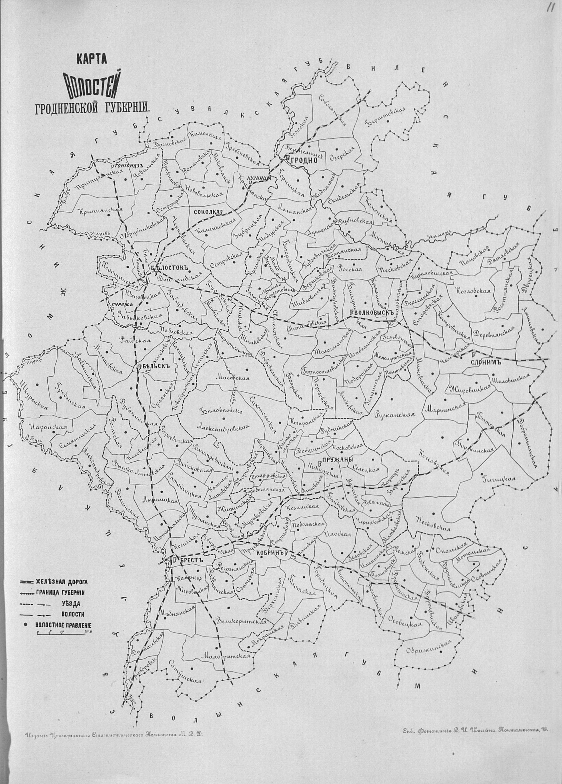 Карта волостей Гродненской губернии